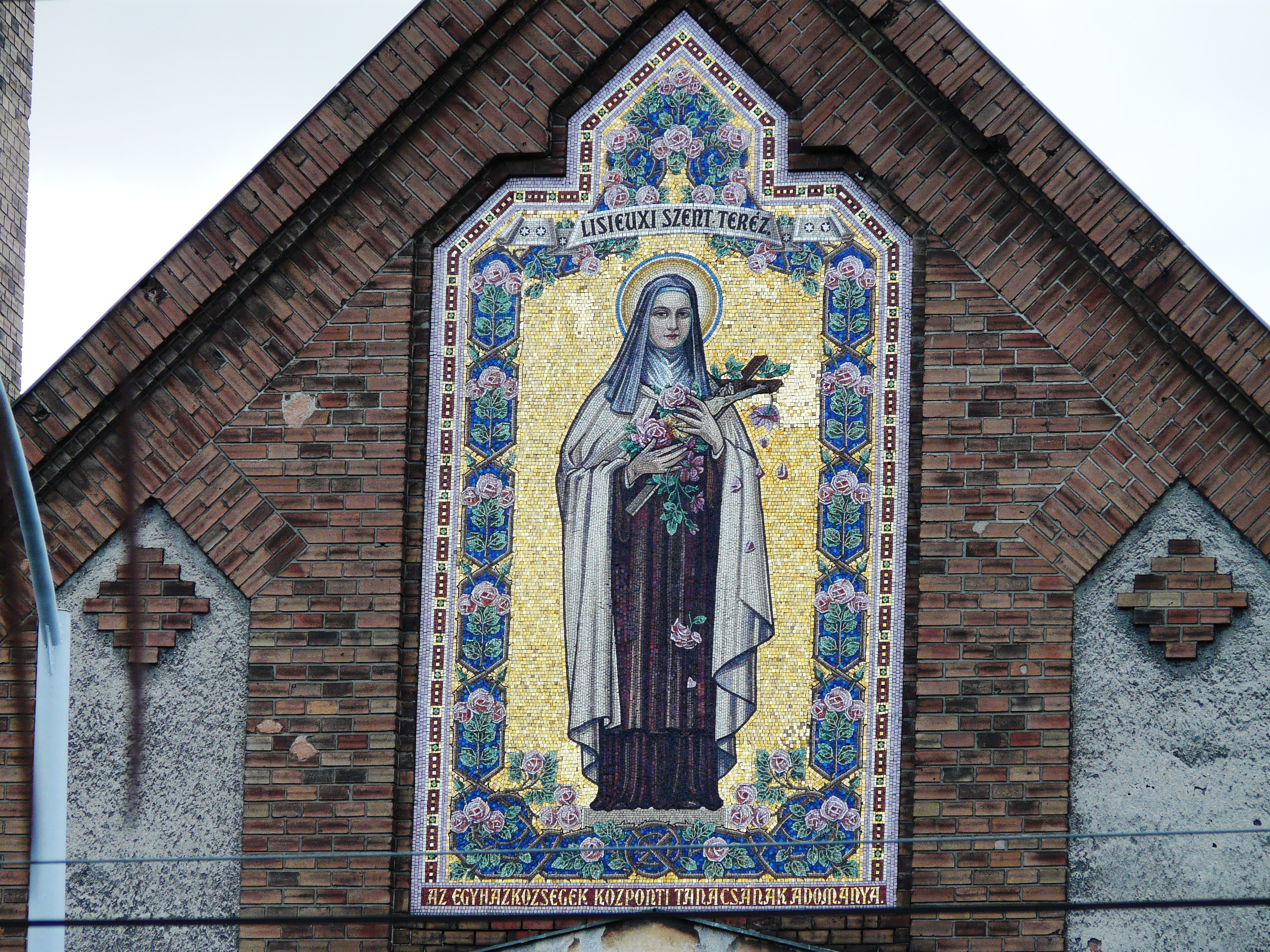 Lisieux-i Szent Teréz-mozaikkép - Magyarország, Budapest, VIII. kerület, Kerepesi út 31. (Zsellér Imre, Petrovácz Gyula (tervező) 1928). A háromszögben végződő oromzatban látható.